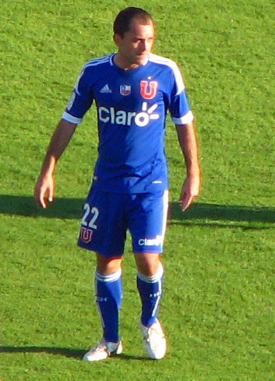 Gustavo Lorenzetti con la camiseta de la U de Chile en el partido que enfrentó a su club con el Colo Colo el 29 de abril de 2012 en el Estadio Nacional de Chile.